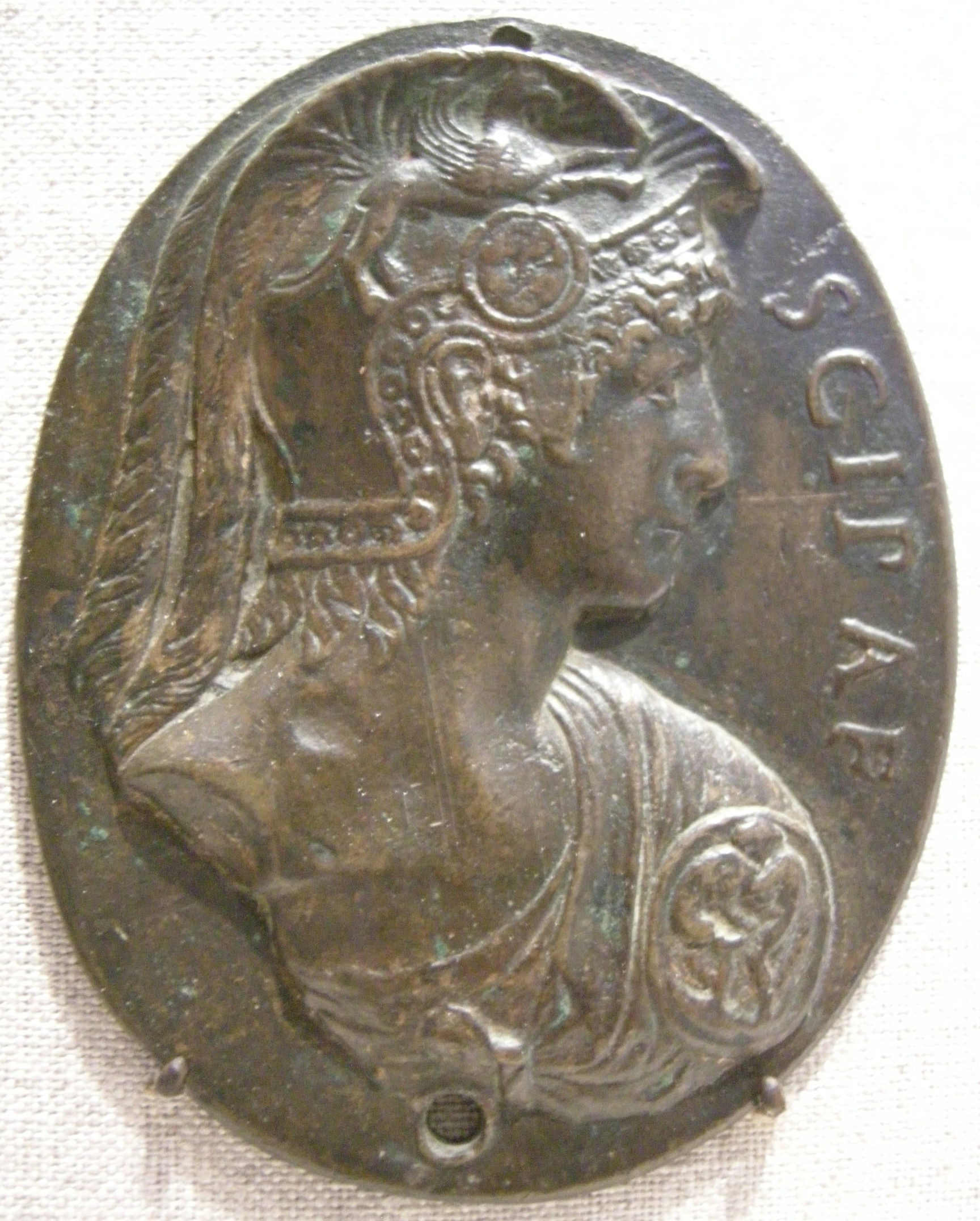 Artista italiano del XVI secolo, scipione l'africano (dall'antico)